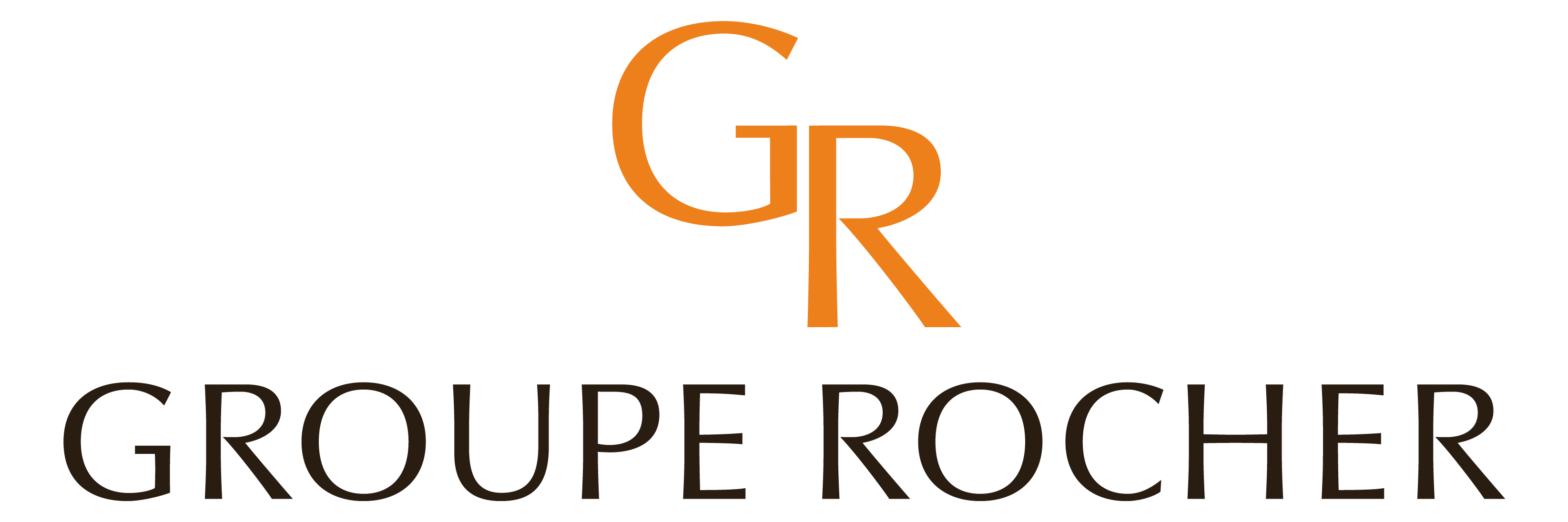 Changement de logo pour le Groupe Rocher